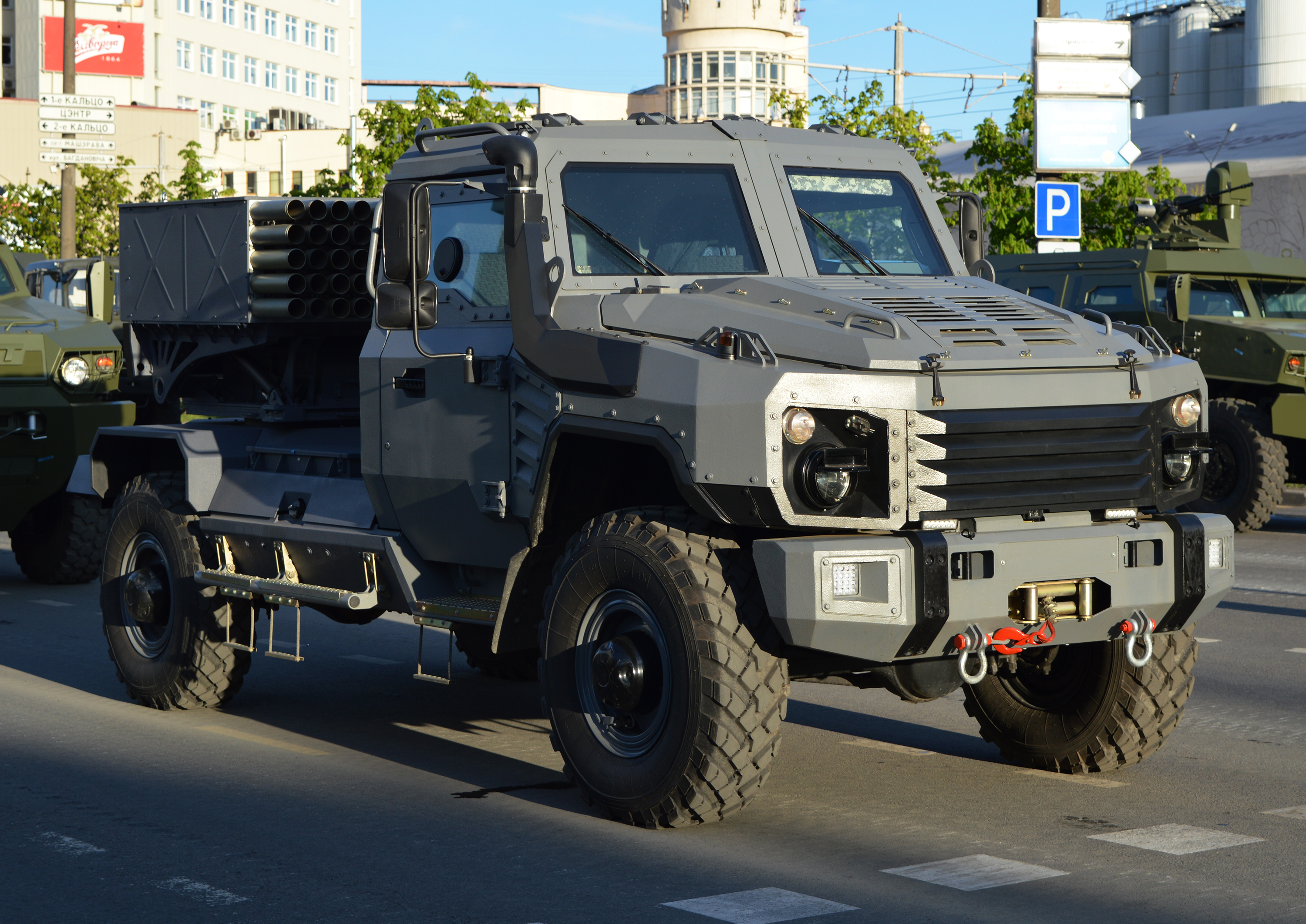 РСЗО Флейта парад 9 мая Минск